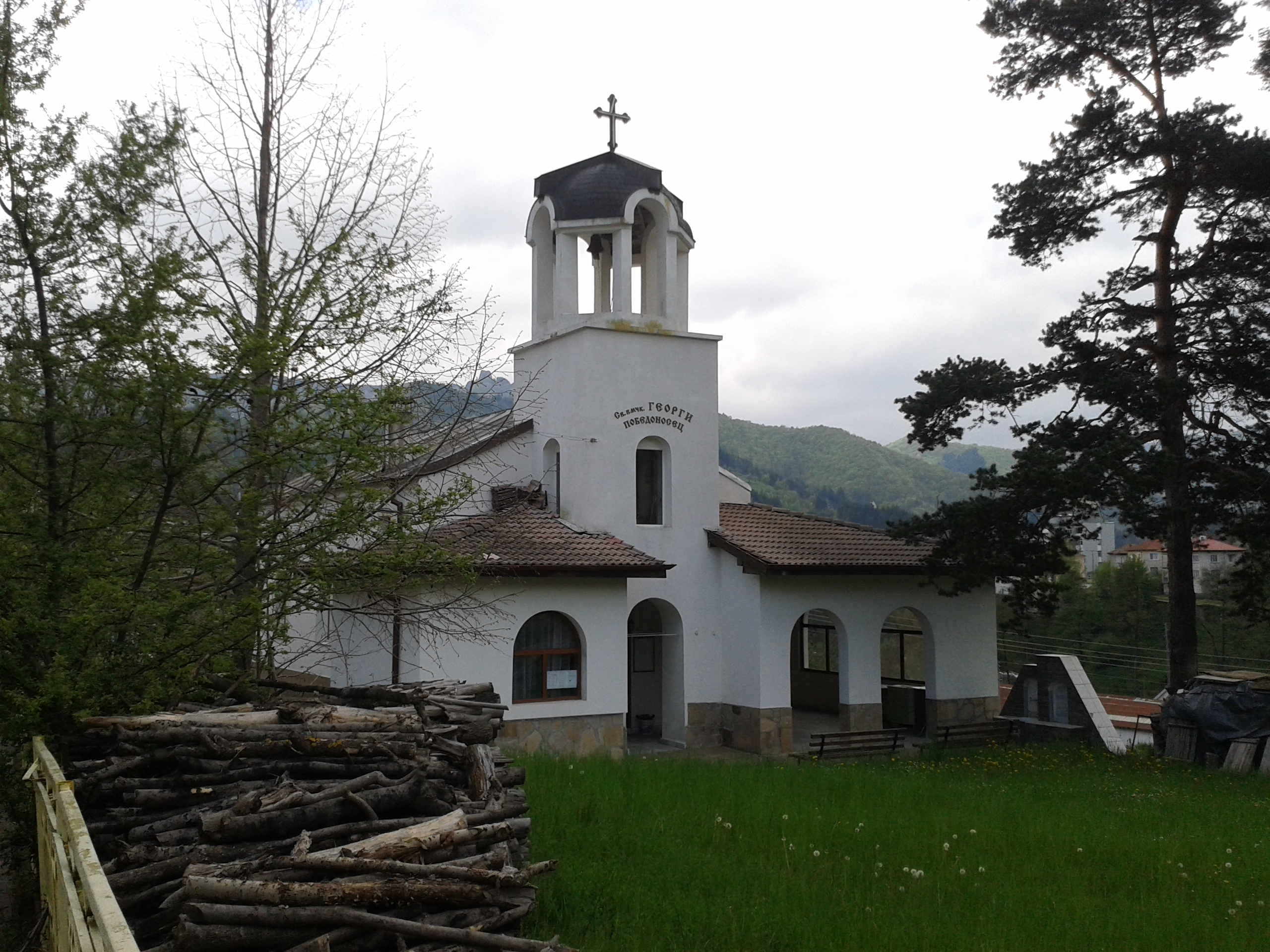 Църквата "Свети Георги" в Рудозем.